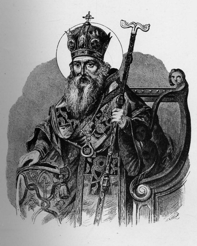 Святой Афанасий Лубенский, по преданию происходящий из рода Родзянок.